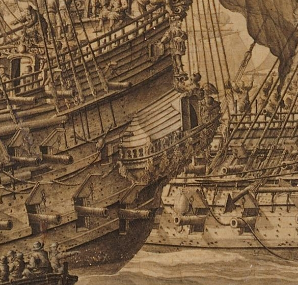 Seitentasche bzw. Seitengalerie eines niederländischen Kriegsschiffes 1672, Ausschnitt von De Nederlandse oorlogsvloot, gereed voor vertrek naar Medway en Sheerness in 1667, eines Gemäldes von Willem van de Velde I